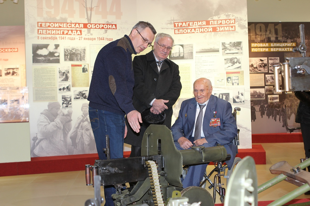 Герой России Алексей Николаевич Ботян в Музее отечественной военной истории